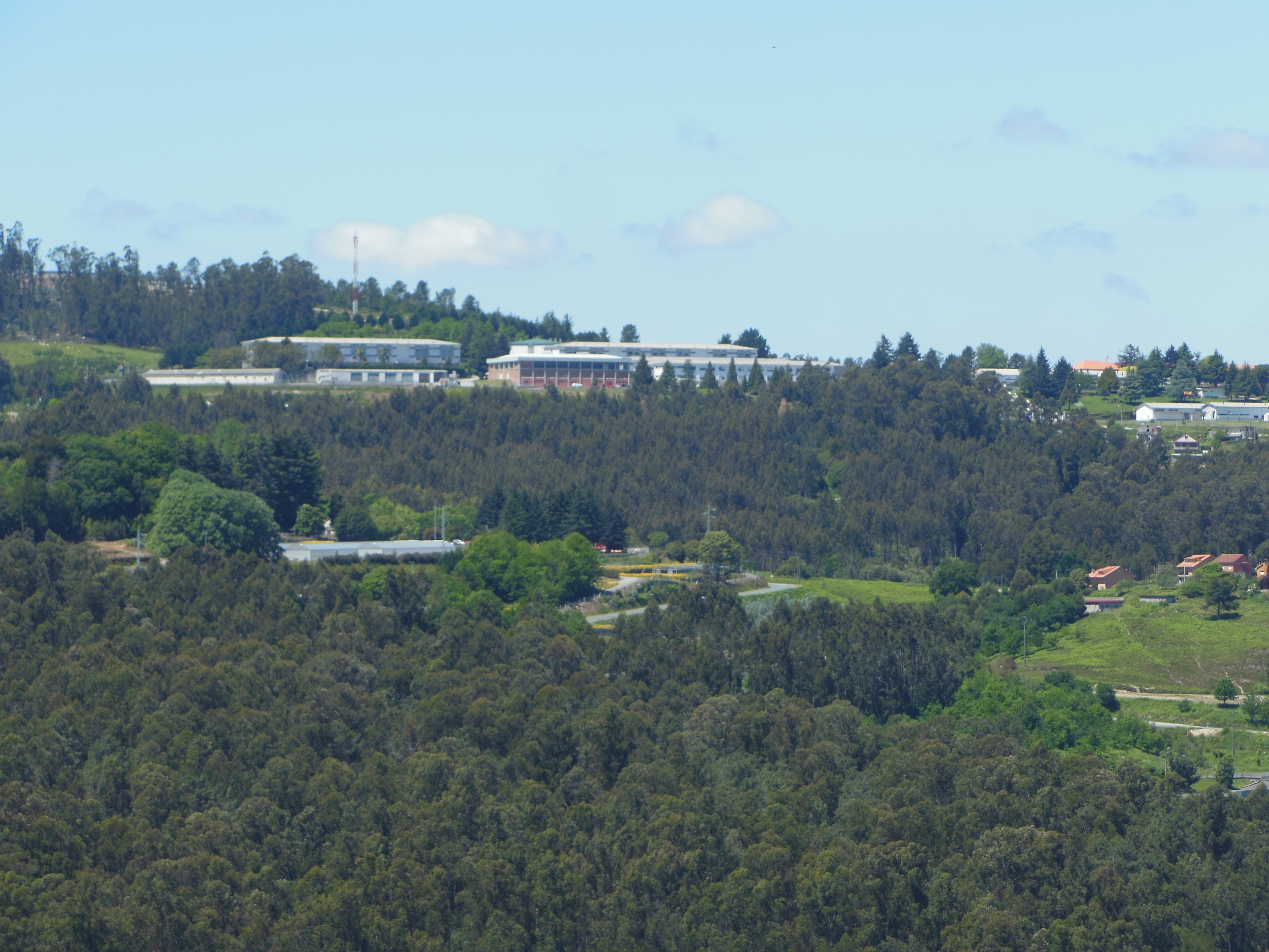 BRILAT desde A Canicouva